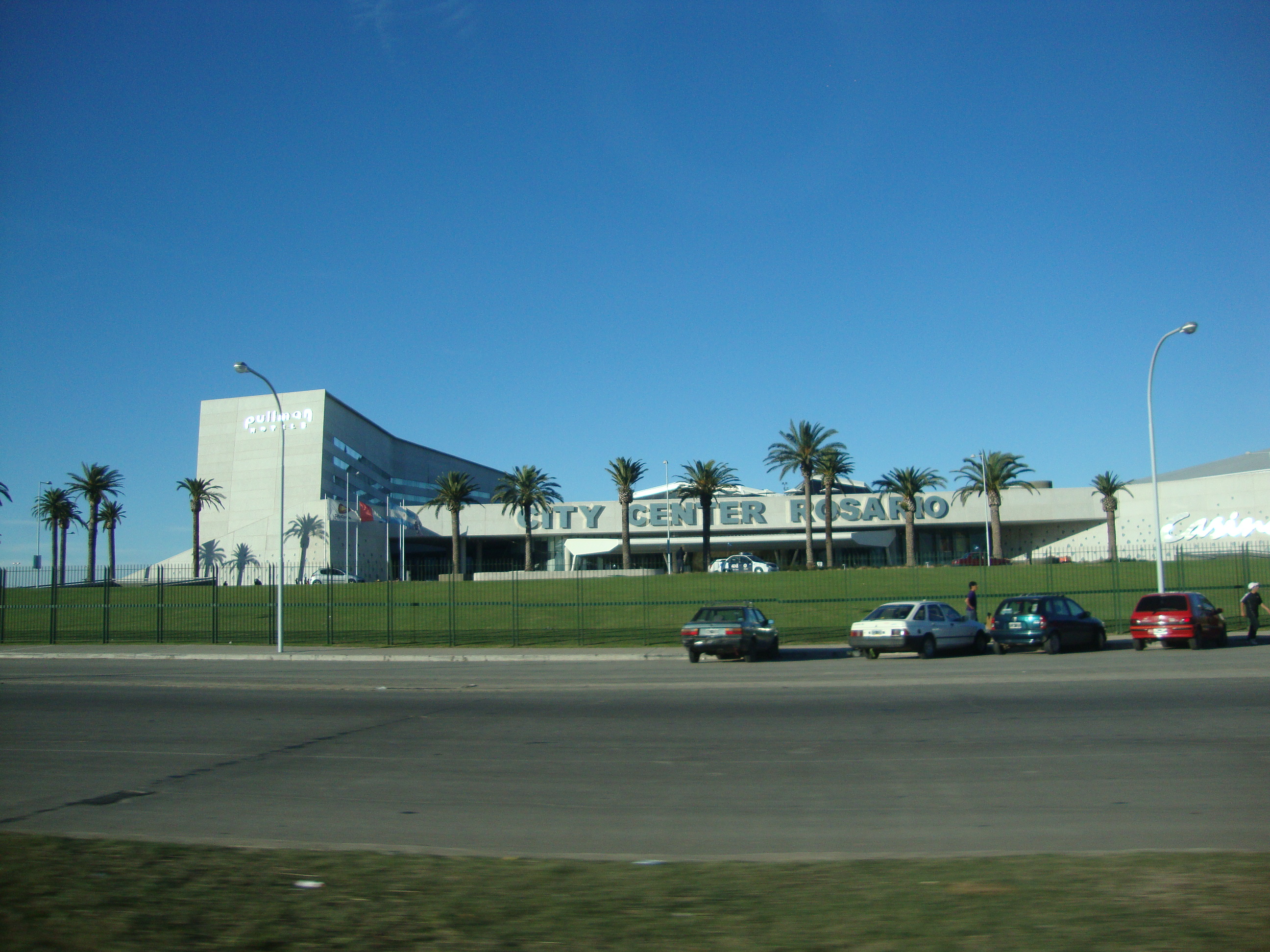 Vista del complejo de hotel, casino y centro de convenciones en Rosario, Argentina. Pocos meses antes de su inauguración al público. Arquitectos: Baudizzone-Lestard Dueño: Cristóbal López Año: 2010